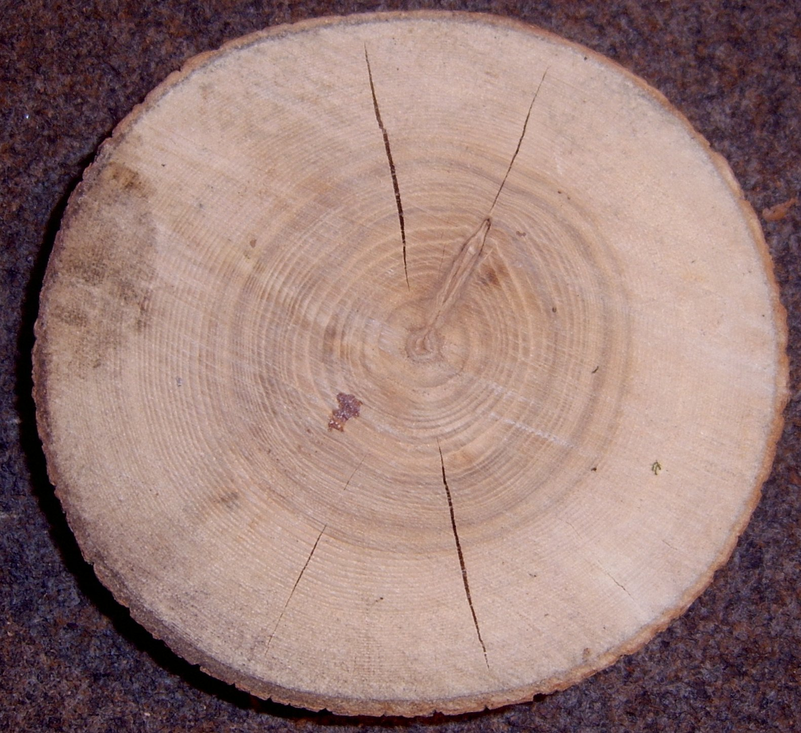 Foto taken by Lumbar 16:41, 6 November 2005 (UTC) in Osnabrück